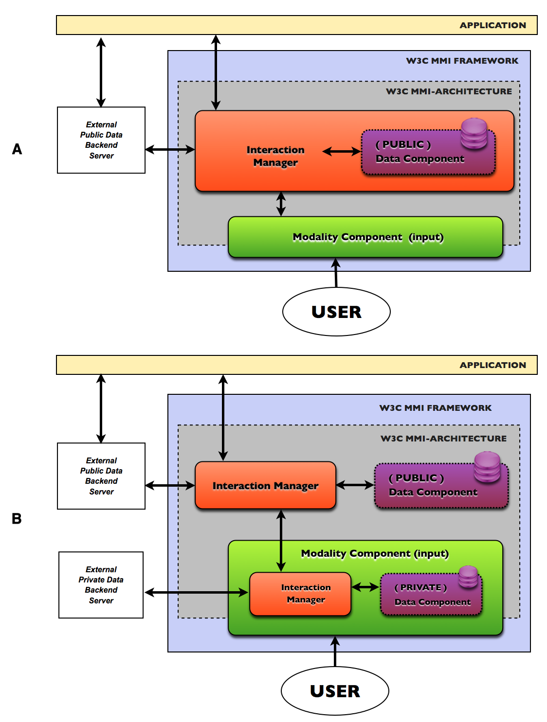 Example d'implémentation des composants de données